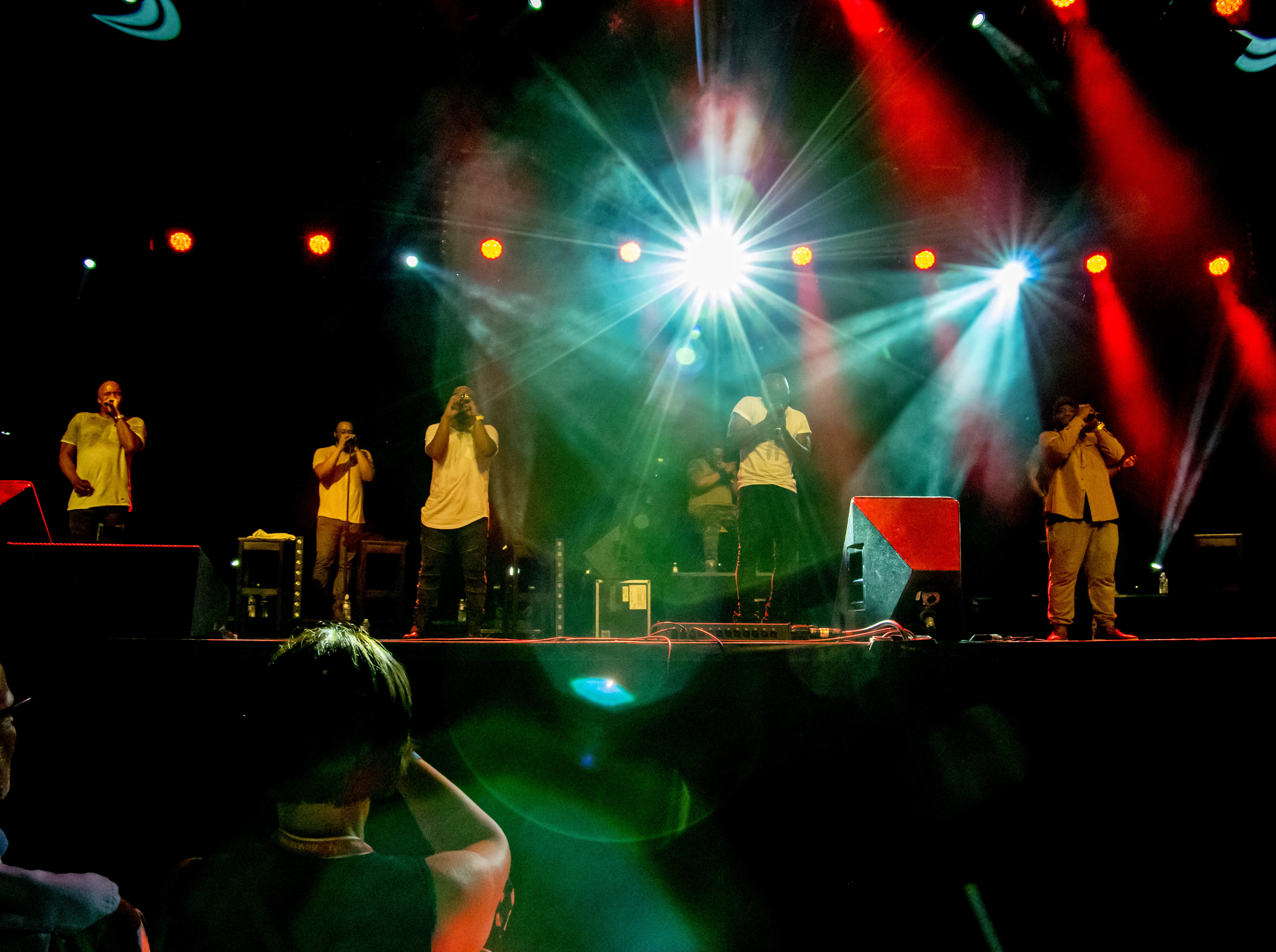 Bilder vom Zelt Musik Festival 2018 in Freiburg im Breisgau Auftritt Naturally 7 am 24. Juli 2018 im Zirkuszelt "A capella Nacht"